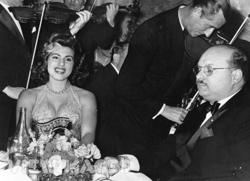 Re Farouk d'Egitto, in esilio in Italia con la cantante lirica italiana Irma Capece Minutolo, a Napoli nel night “Shaker” chiuso nel 1959 per un incendio causato da un corto circuito